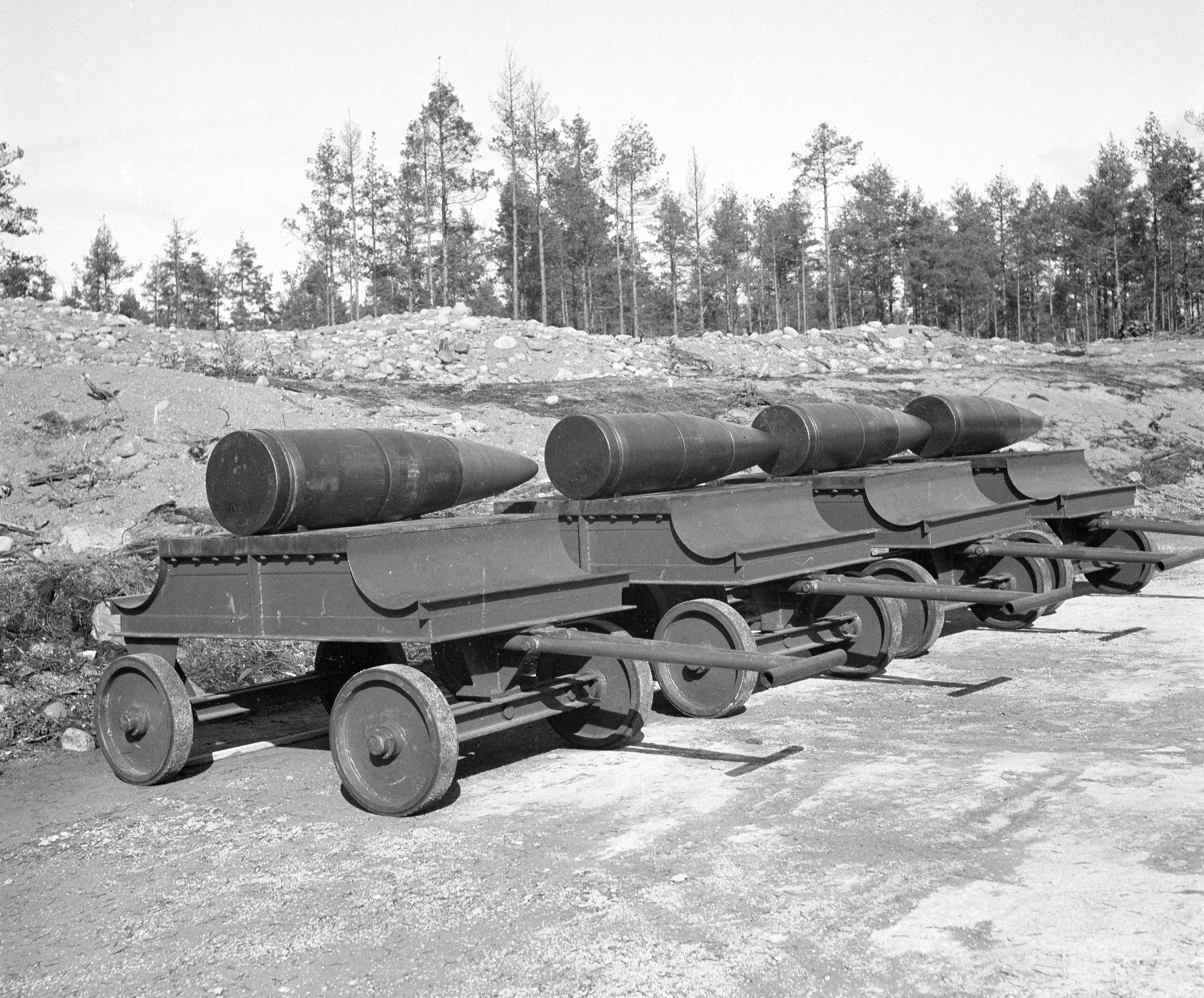 30,5 sm rautatietykin ammuksia. (Kuvassa näkyy ammuksia maassa olevailla ammusvaunuilla, sivuilla olevat panosten lokerot ovat tyhjät. SA-kuvan 137855 tietojen perusteella kranaatit ovat 470 kg mallia) Kuvauspaikka: Hanko